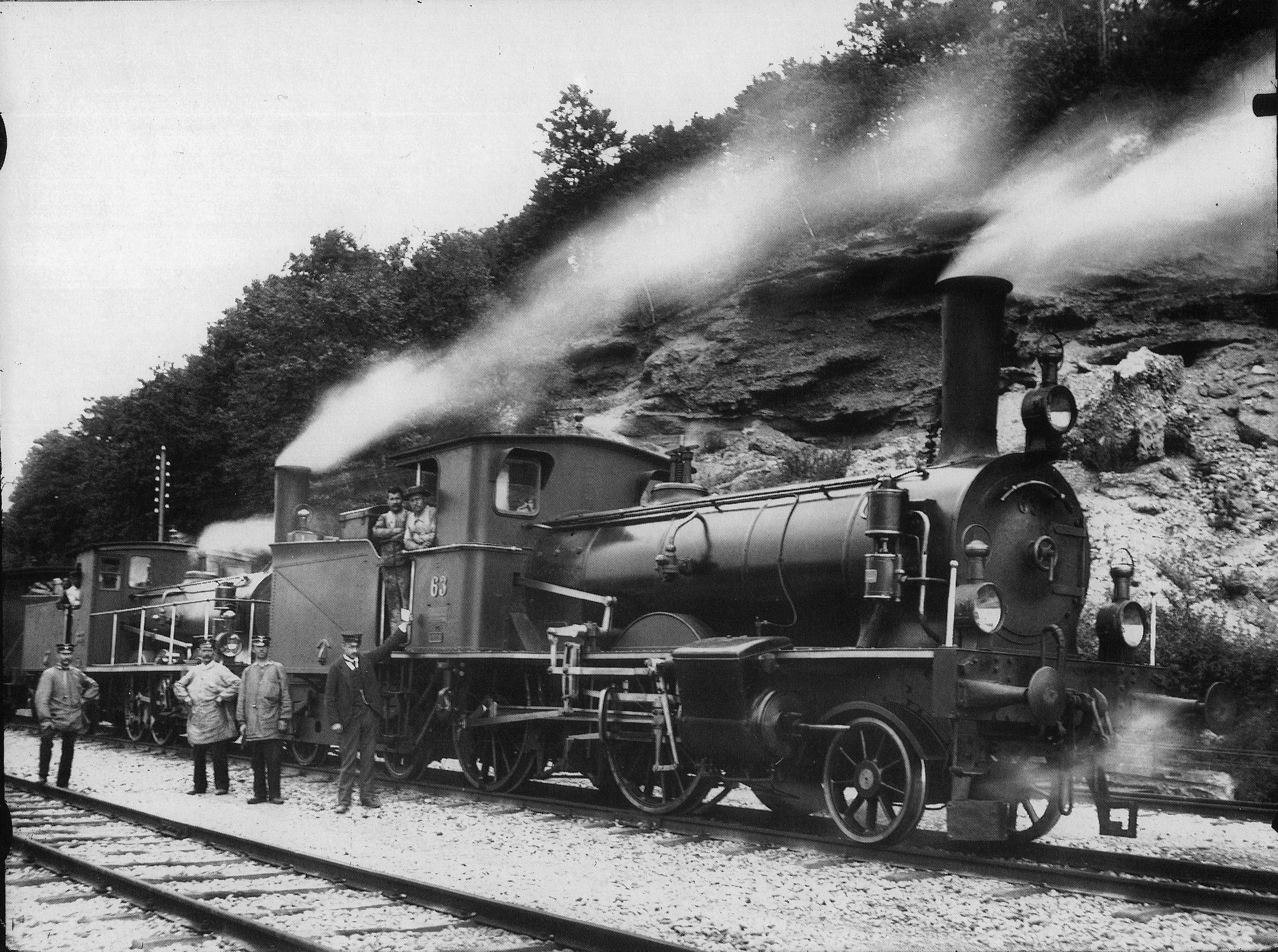 Schlepptender-Locomotive Nr. 63 des Typs A2T der Schweizeriſchen Nordoſtbahn, gebaut 1894 inn der Schweizeriſchen Locomotiv- und Machines-Fabrique zů Winterthur (Fabr.-Nr. 875), 1902 von den Schweizeriſchen Bundesbahnen übernommen als B 2/3 Nr. 1173, 1917 außer Dienſt geſtellt und anſchließend abgebrochen; dahinter eine Locomotive des Typs C3T; aufgnommen um 1902.